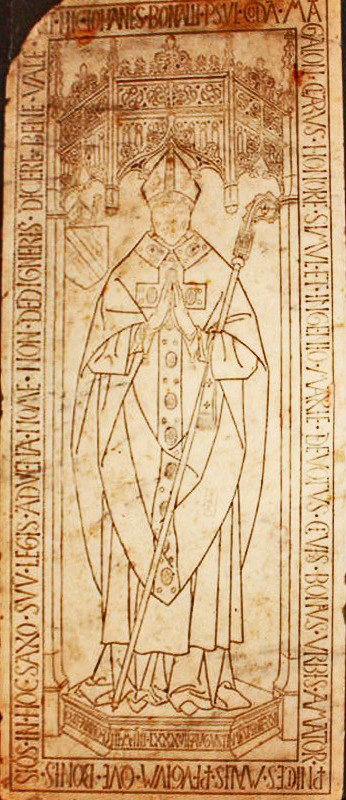 Cathédrale_de_Maguelone, Grabplatte